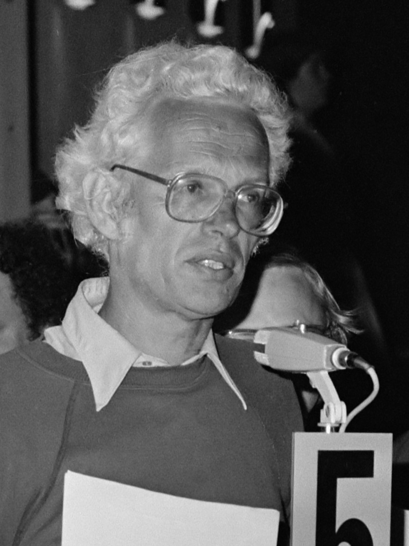 Aandeelhoudersvergadering SHELL in Den Haag; Sietse Bosgra van Anti-Apartheidsgroep aan het woord 15 mei 1986